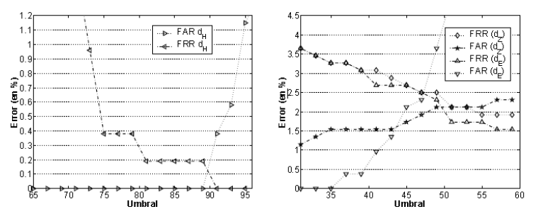 grafica con los resultados del analisis del iris